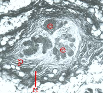 Juxtaorales Organ mit den Hüllen, W.Zenker